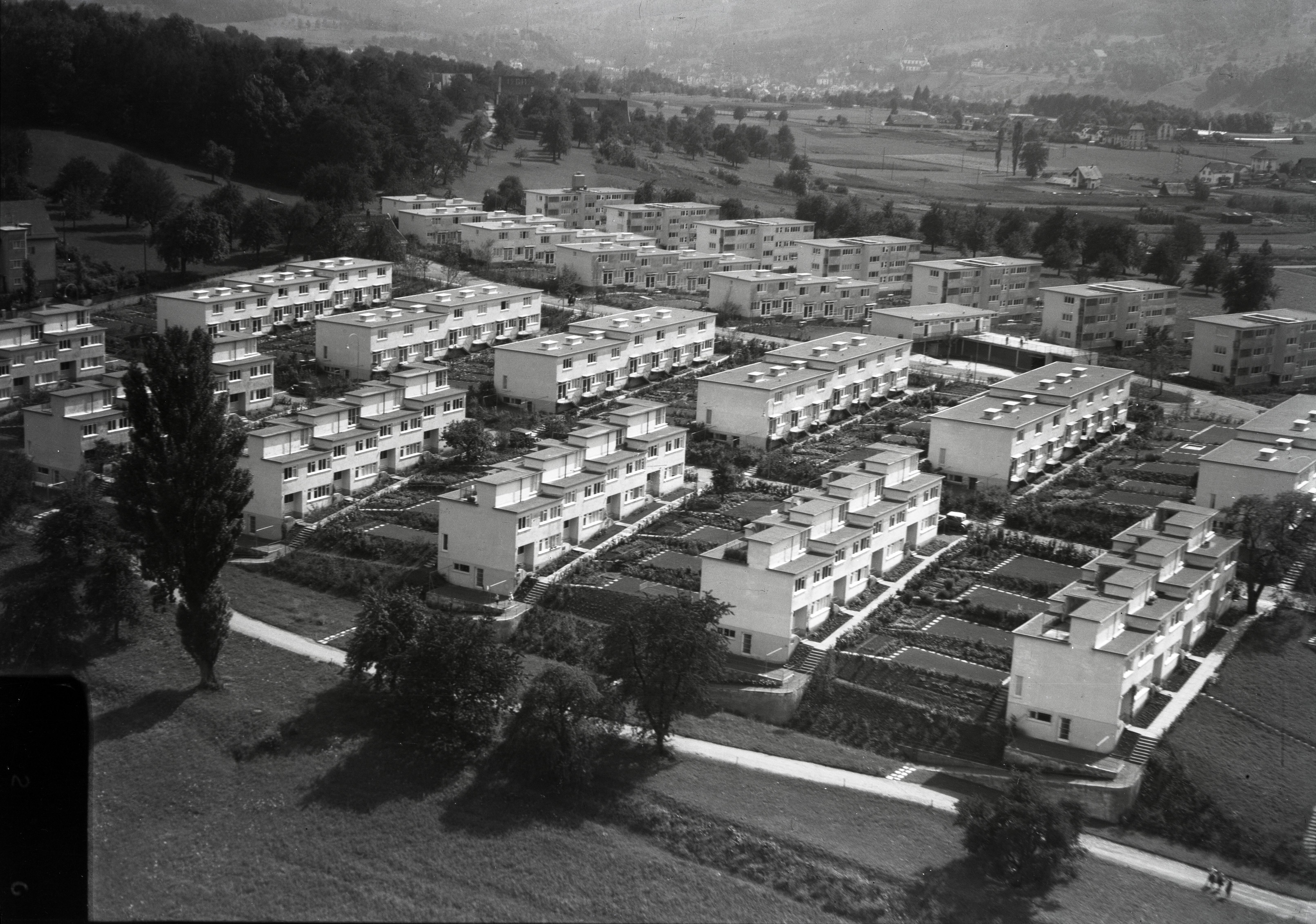 Kolonie Neubühl, Zürich-Wollishofen, Schweiz: 1.7.1932 Fotograf: Walter Mittelholzer